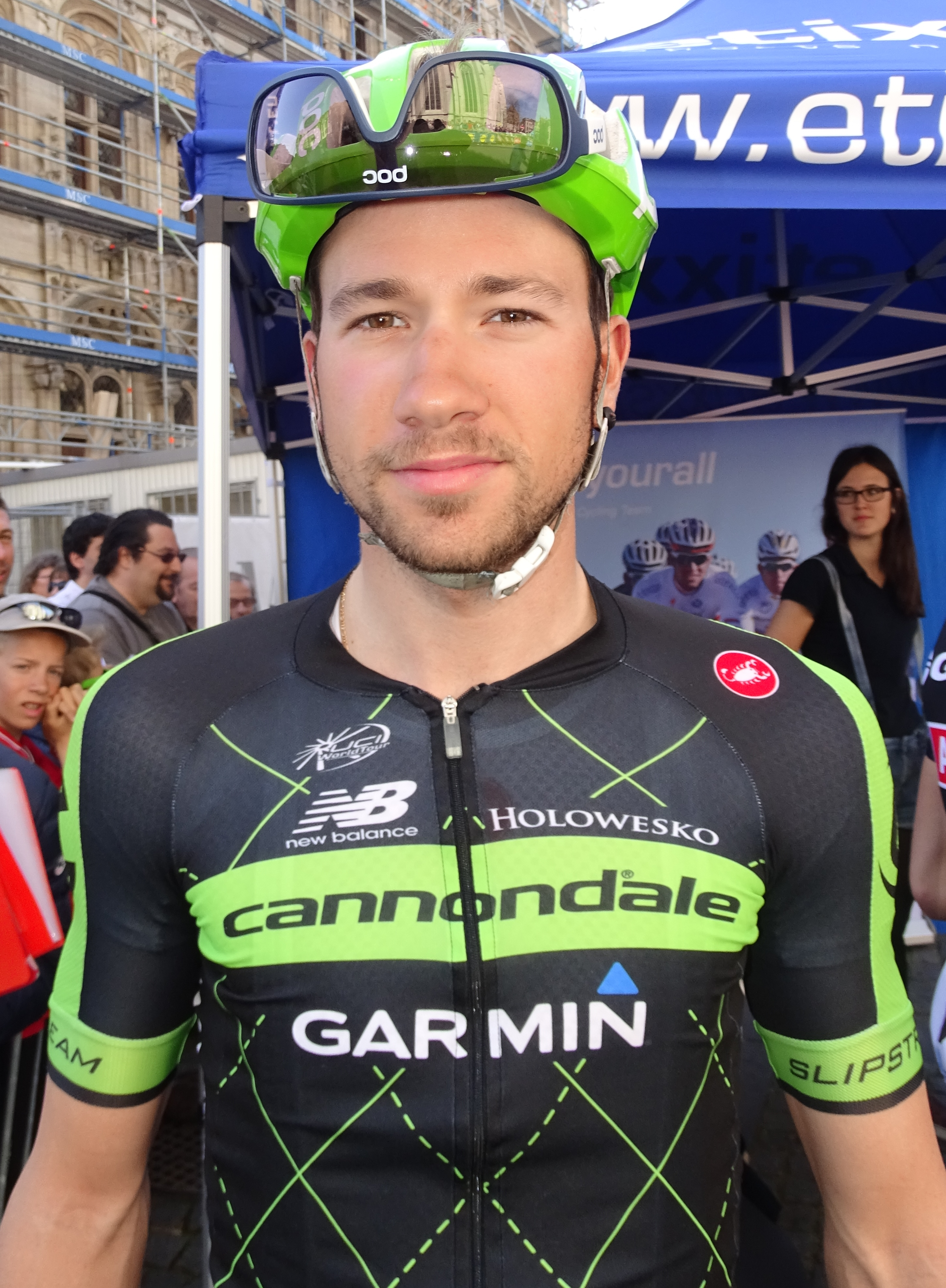 Reportage réalisé le mercredi 15 avril à l'occasion du départ de la Flèche brabançonne 2015 à Louvain, Belgique.